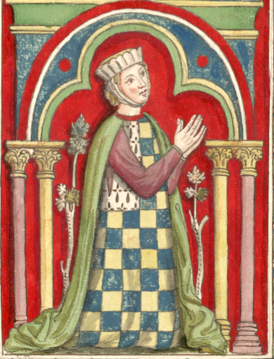 Alix de Thouars